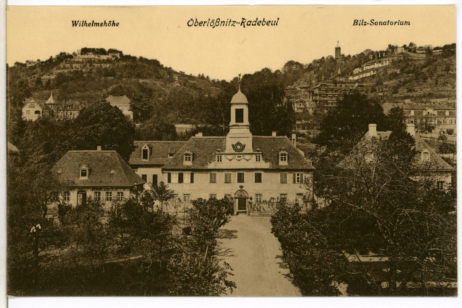 Radebeul; Oberlößnitz, Wilhelmshöhe, Bilz-Sanatorium This postcard is from publisher Brück & Sohn in Meißen ( postcard has a unique number 10845 and is available in a higher resolution at the publisher. This images was uploaded in a cooperation project between Wikipedians and the publisher.